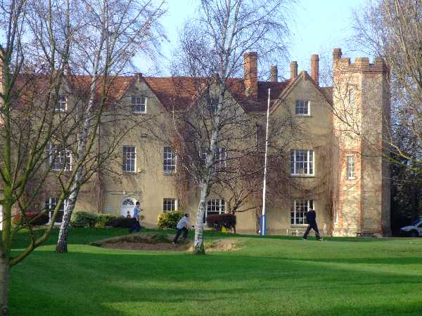 Rochford Hall